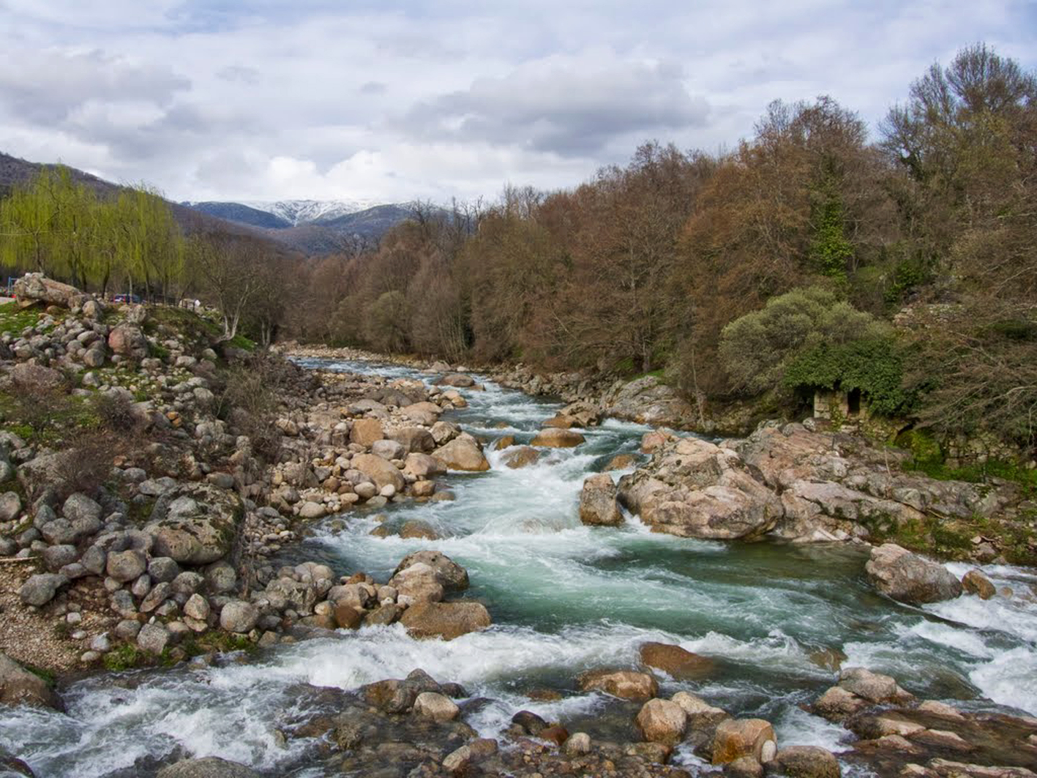 Aguas del deshielo de los neveros de la Sierra de Gredos, sobre una de las gargantas (Garganta de Cuartos), del Valle del Jerte, en Cáceres. This is a photography of a Site of Community Importance in Spain with the ID: ES4320038. Natura2000 entry, EEA entry